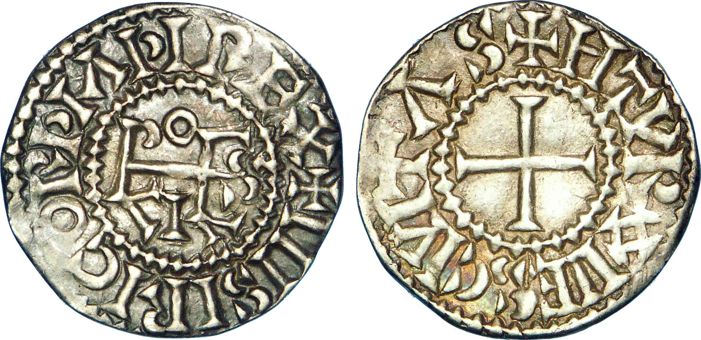 Nom de l'atelier/ville : Tours Métal : argent Diamètre : 19,5mm Axe des coins : 8h. Poids : 1,54g. Titulature avers : + IIISIRICORDIA D-I REX, (légende commençant à 3 heures). Description avers : Monogramme de Louis (LVDOVICVS). Traduction avers : (Louis miséricordieux par la grâce de Dieu). Titulature revers : + HTVRONES CIVITAS, (O losangé). Description revers : Croix. Traduction revers : (Cité de Tours).